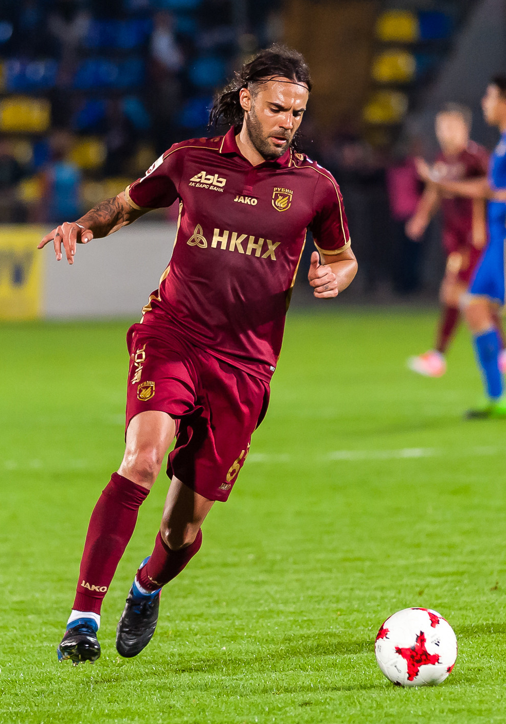 «Ростов» - «Рубин»